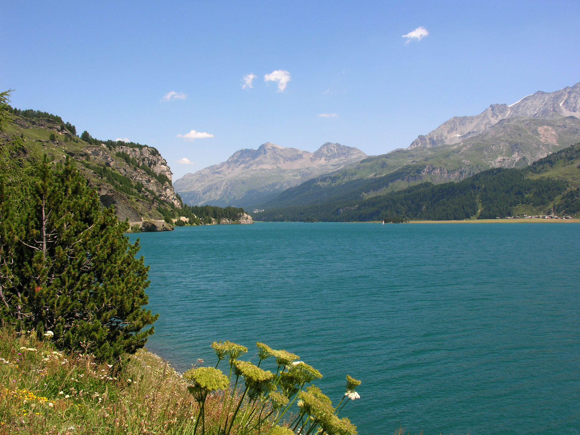 Switzerland, Graubünden, Lake Sils